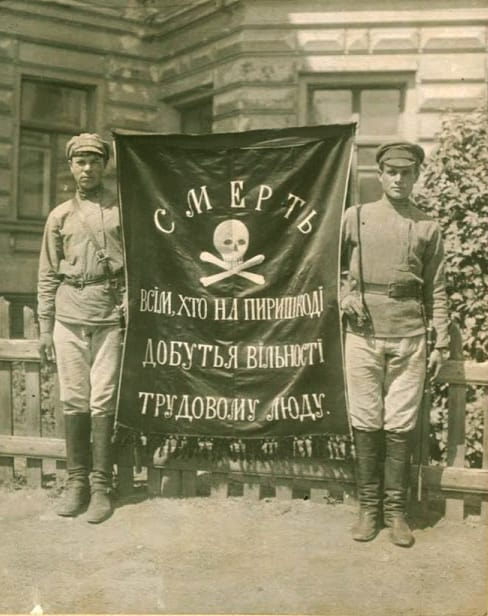 Один из лозунгов махновцев